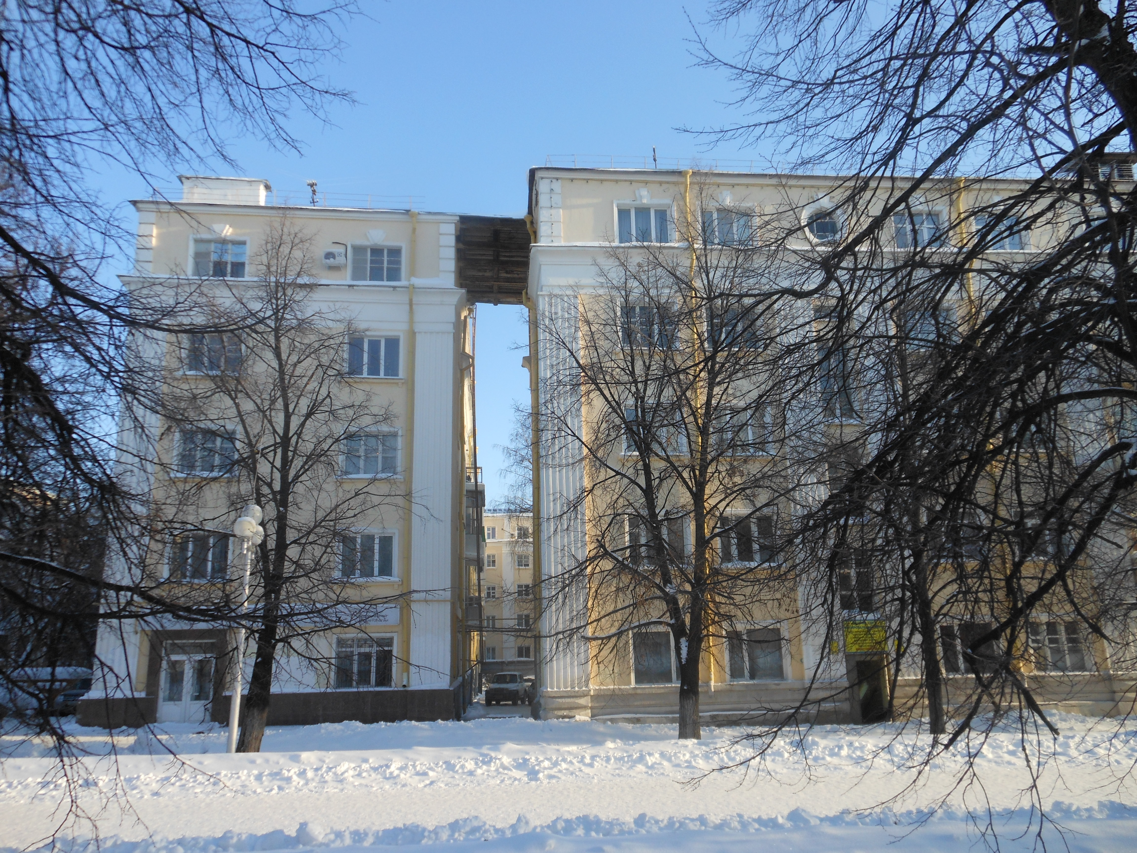 декабрь, 2013 год